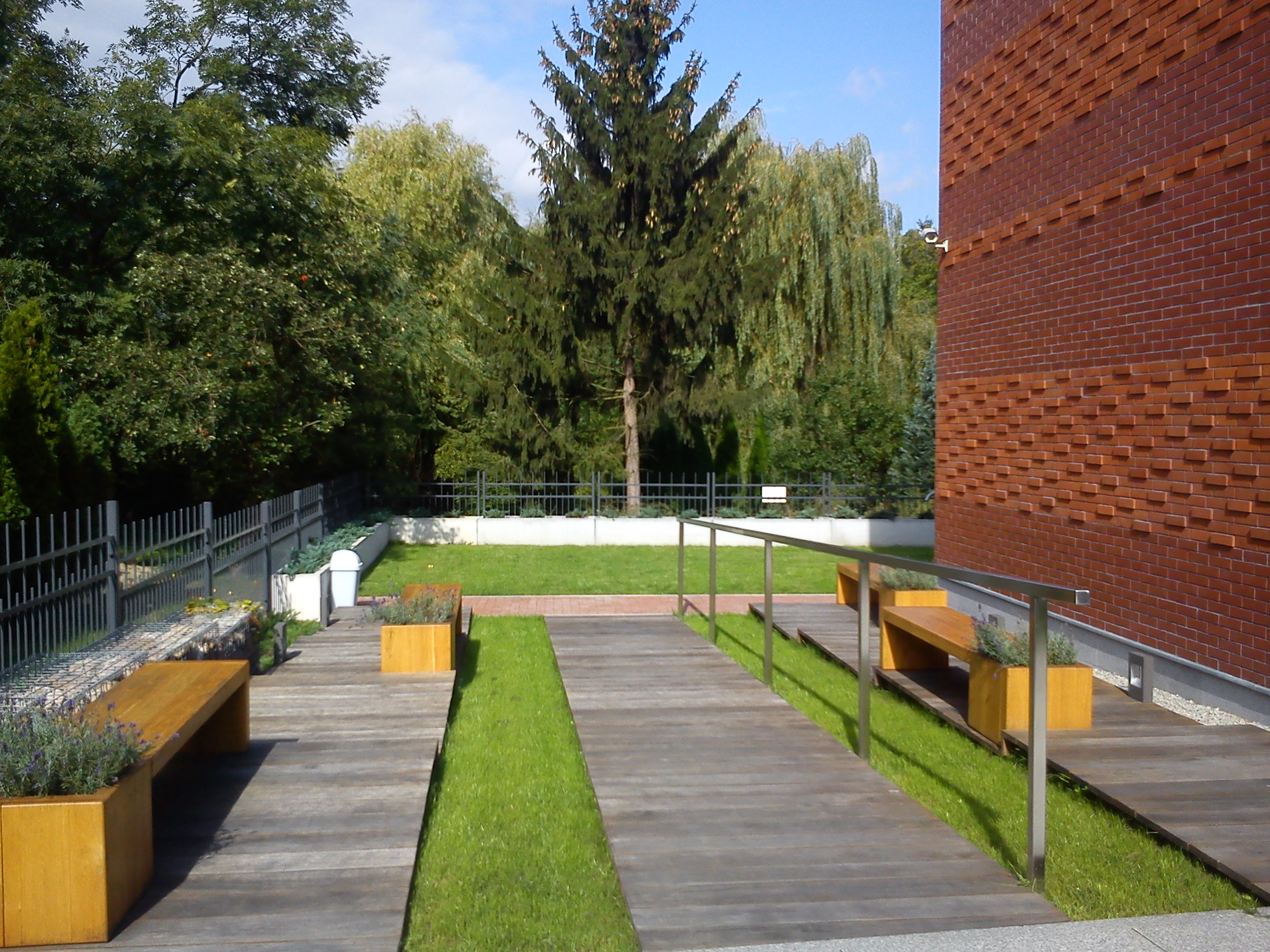 Rezerwat archeologiczny Genius Loci - Poznań, Ostrów Tumski.